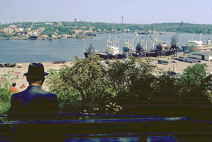 Utsikt mot Galärvarvet och Djurgården från Södermalm. Bilden troligen från början av 1970-talet. Motiv: Stockholms innerstad Nyckelord: Riksintressen Kategori: Stadsmiljö Utsikt mot Galärvarvet och Djurgården från Södermalm. Bilden troligen från början av 1970-talet.